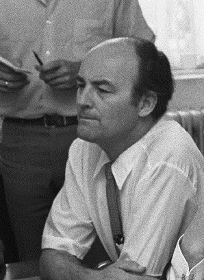 Persconferentie van de fractieleiders van de vier overgebleven regeringspartijen; v.l.n.r.: Aantjes (ARP), Wiegel (VVD) Andriessen (KVP) en Tilanus (CHU)